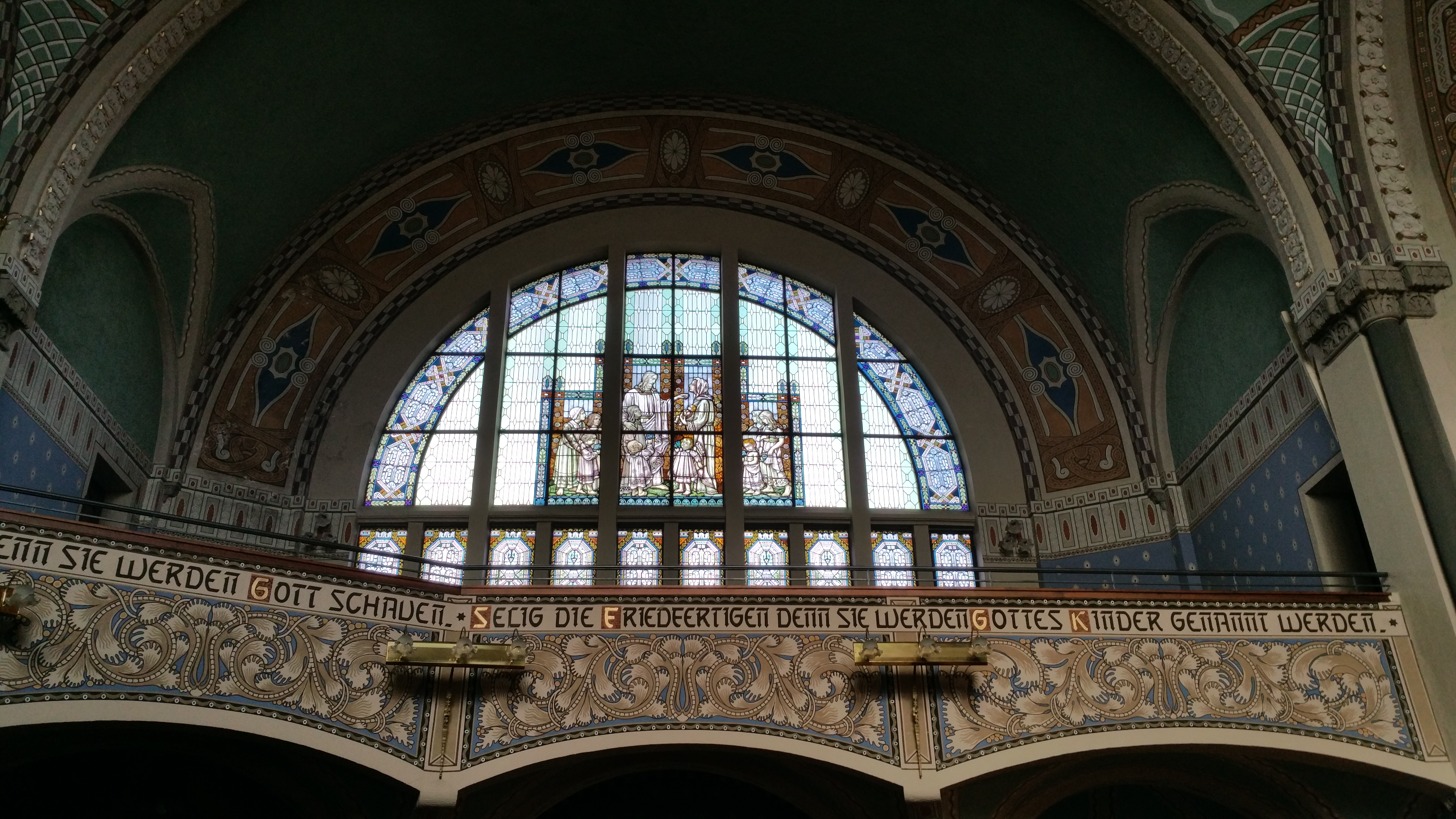 Westempore mit Jugenstilfenster, evangelische Immanuel-Kirche Dortmund Marten